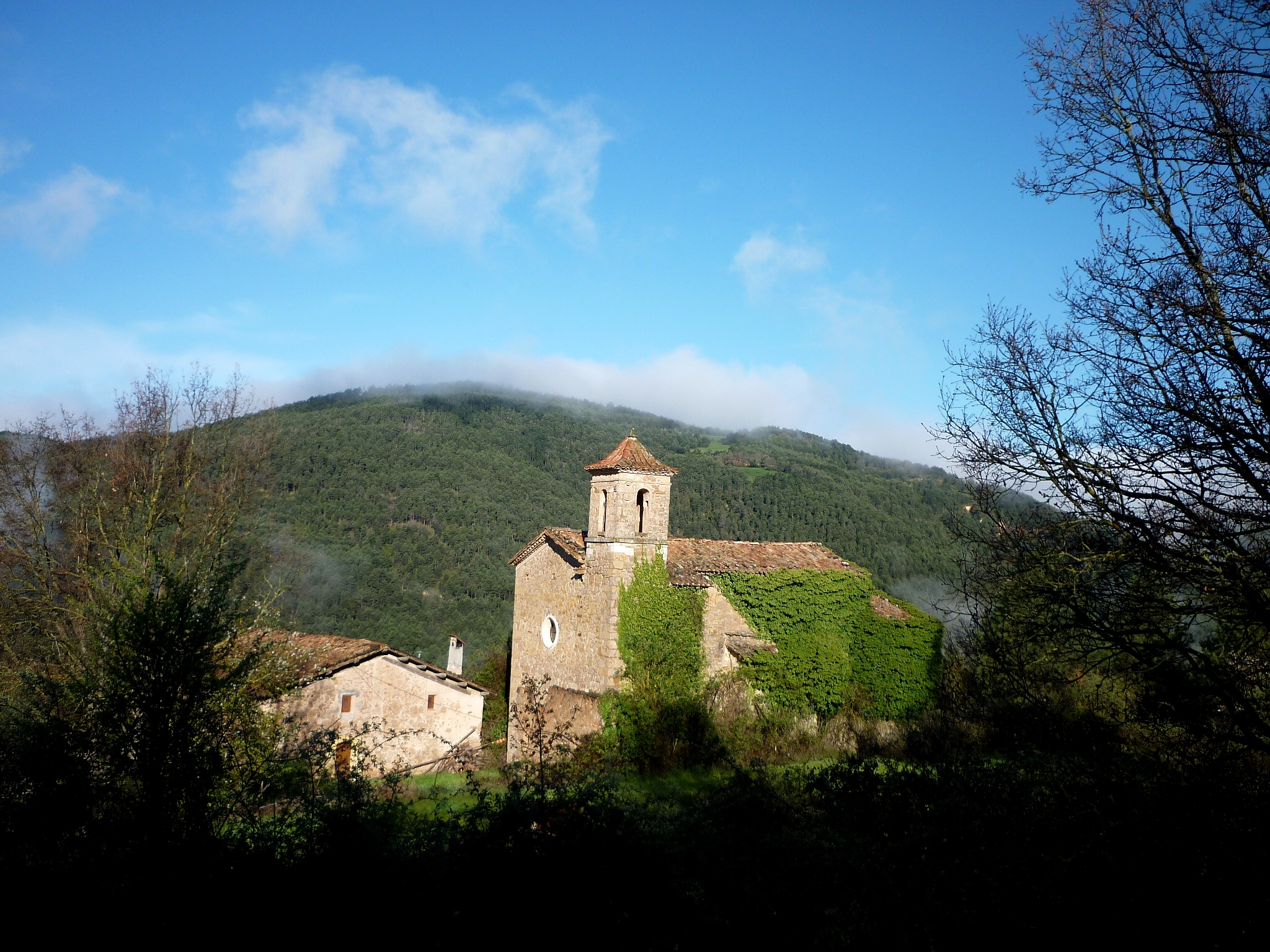 Santuari de la Mare de Déu de la Mata (Castellar del Riu)